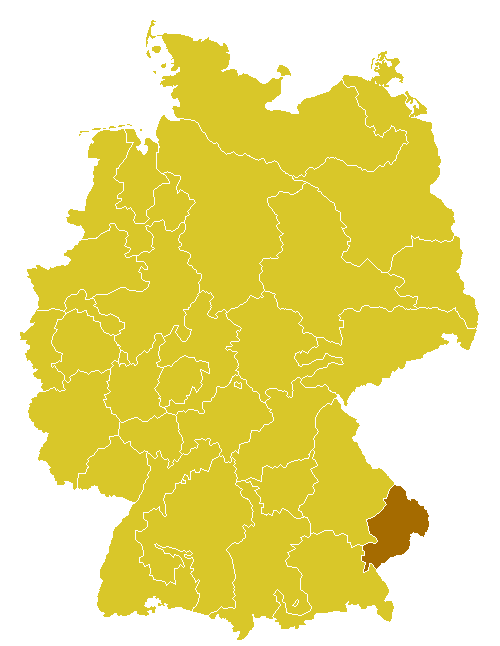 site of dioecese Passau